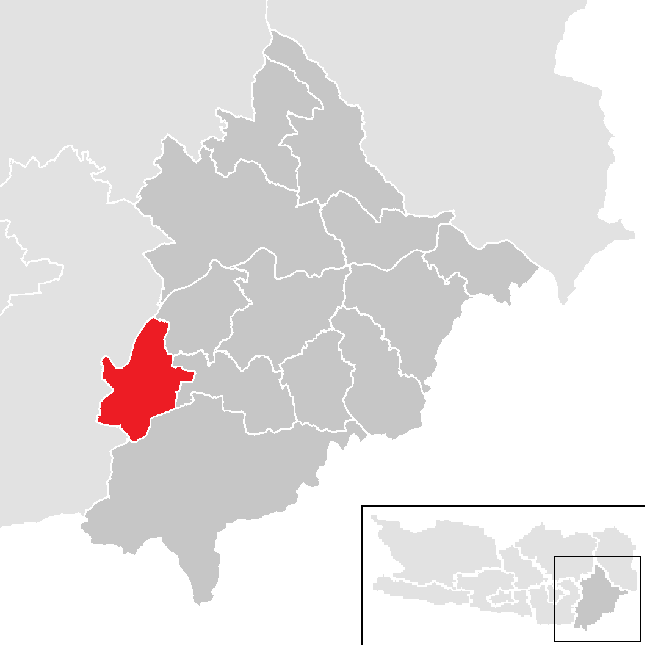 Bezirk Völkermarkt